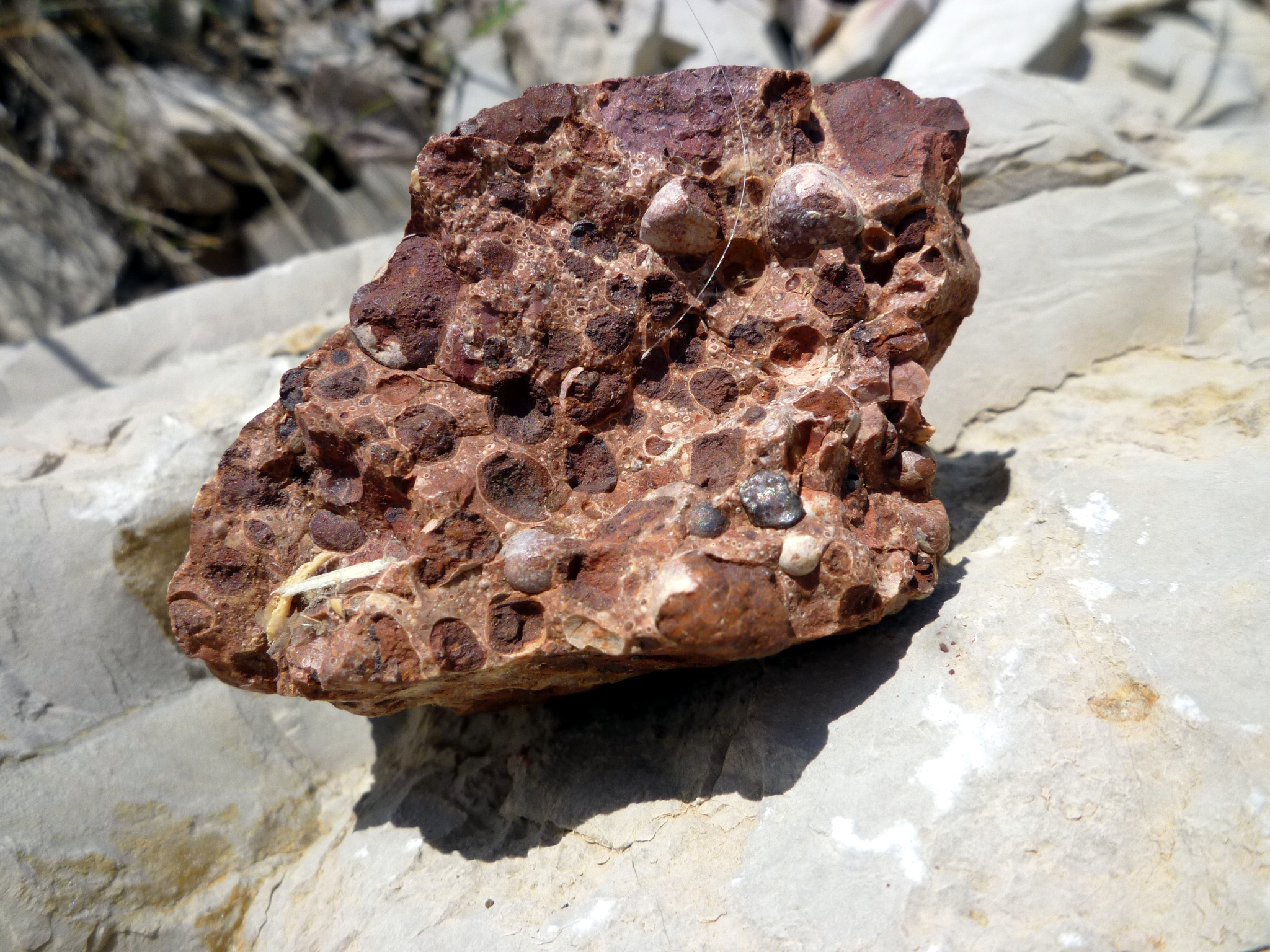 Mostra de bauxita recollida a l'aflorament de Coll de Porta (Camarasa - Noguera) This is a a photo of a geologic site or geotope in Catalonia, Spain, with id: IEIGC-133